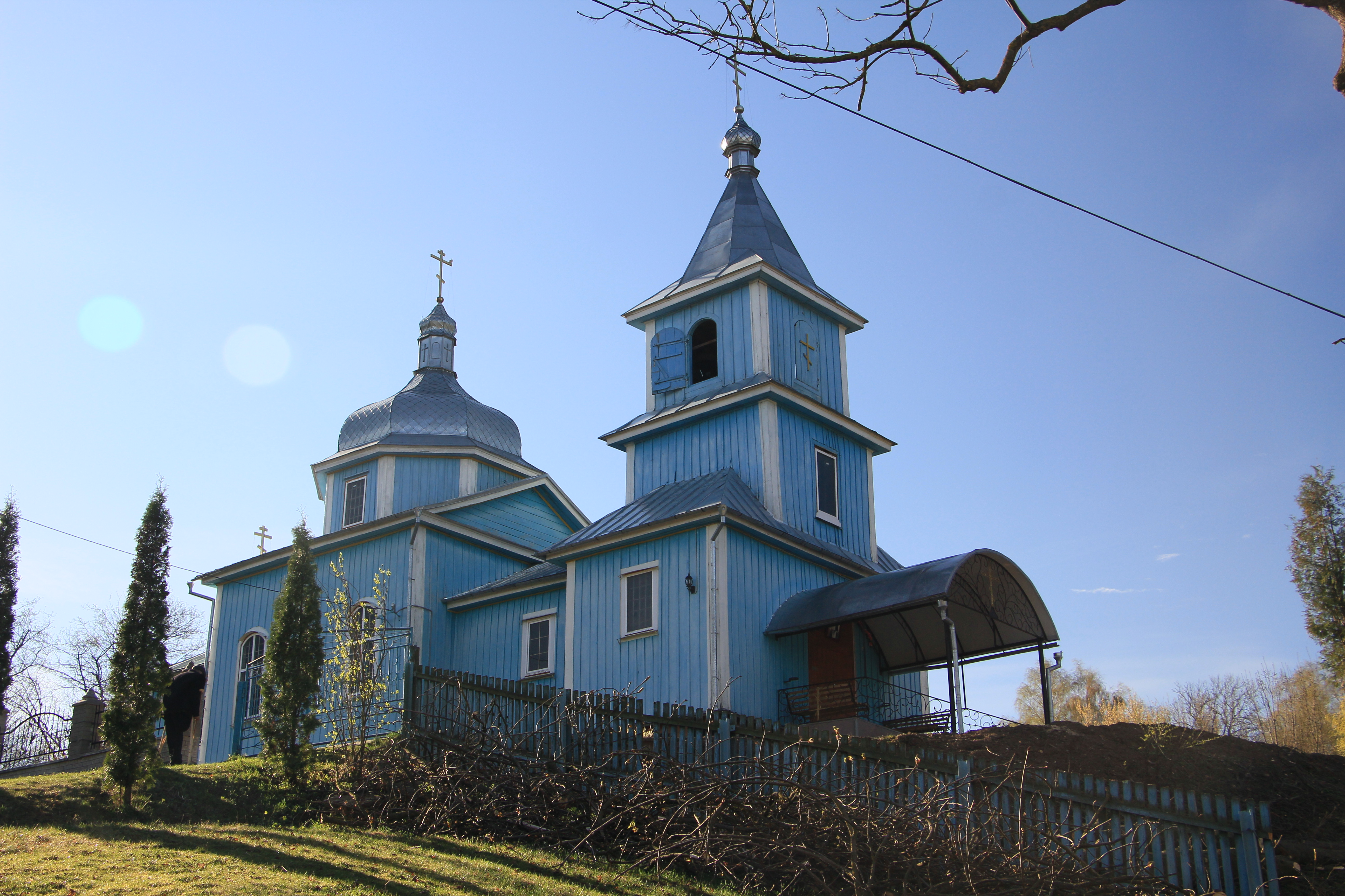 Дерев'яна церква в селі Підгайці Шумського району Тернопільської області